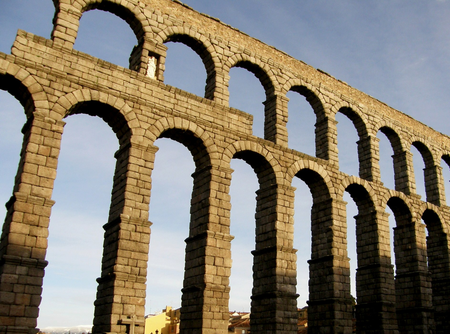 Acueducto de Segovia: Construido por el Imperio romano a principios del siglo II - Segovia - España.